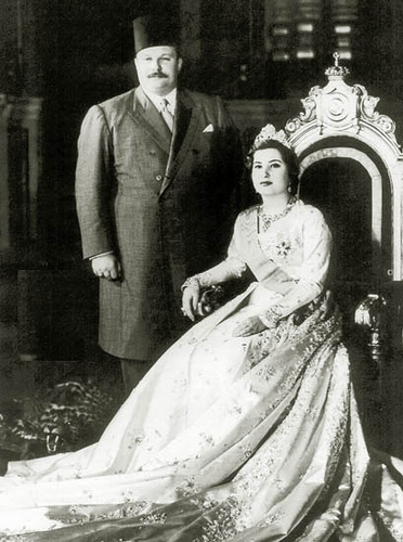 الملك فاروق مع الملكة ناريمان صادق في يوم زفافهما.